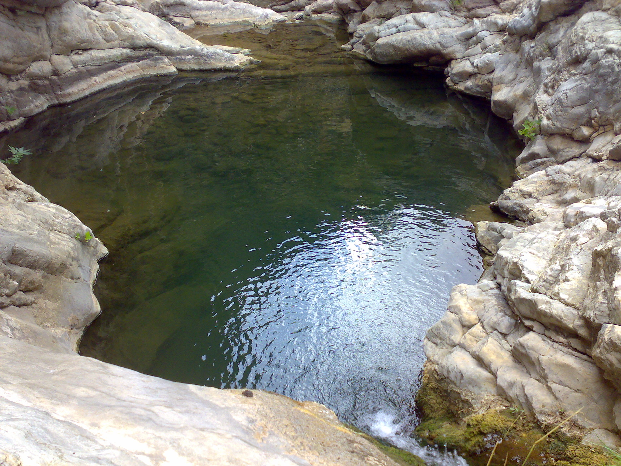 Adıyaman merkeze bağlı Sakallı köyünden bir görüntü.